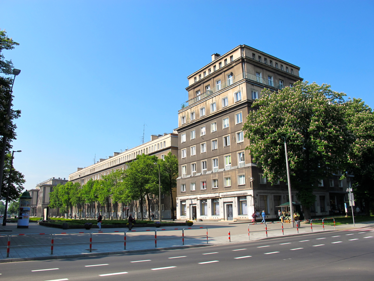 View from the street Aleja Roz in Nowa Huta in Krakow